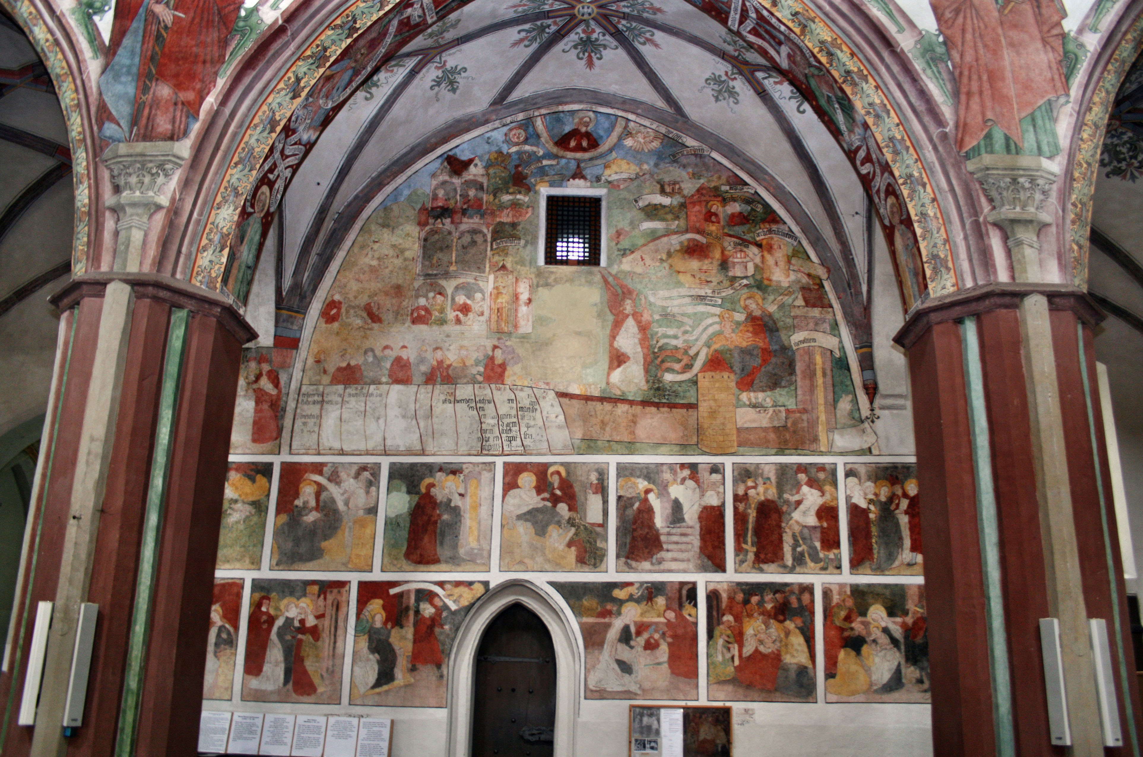 Unser Frauen (Memmingen)